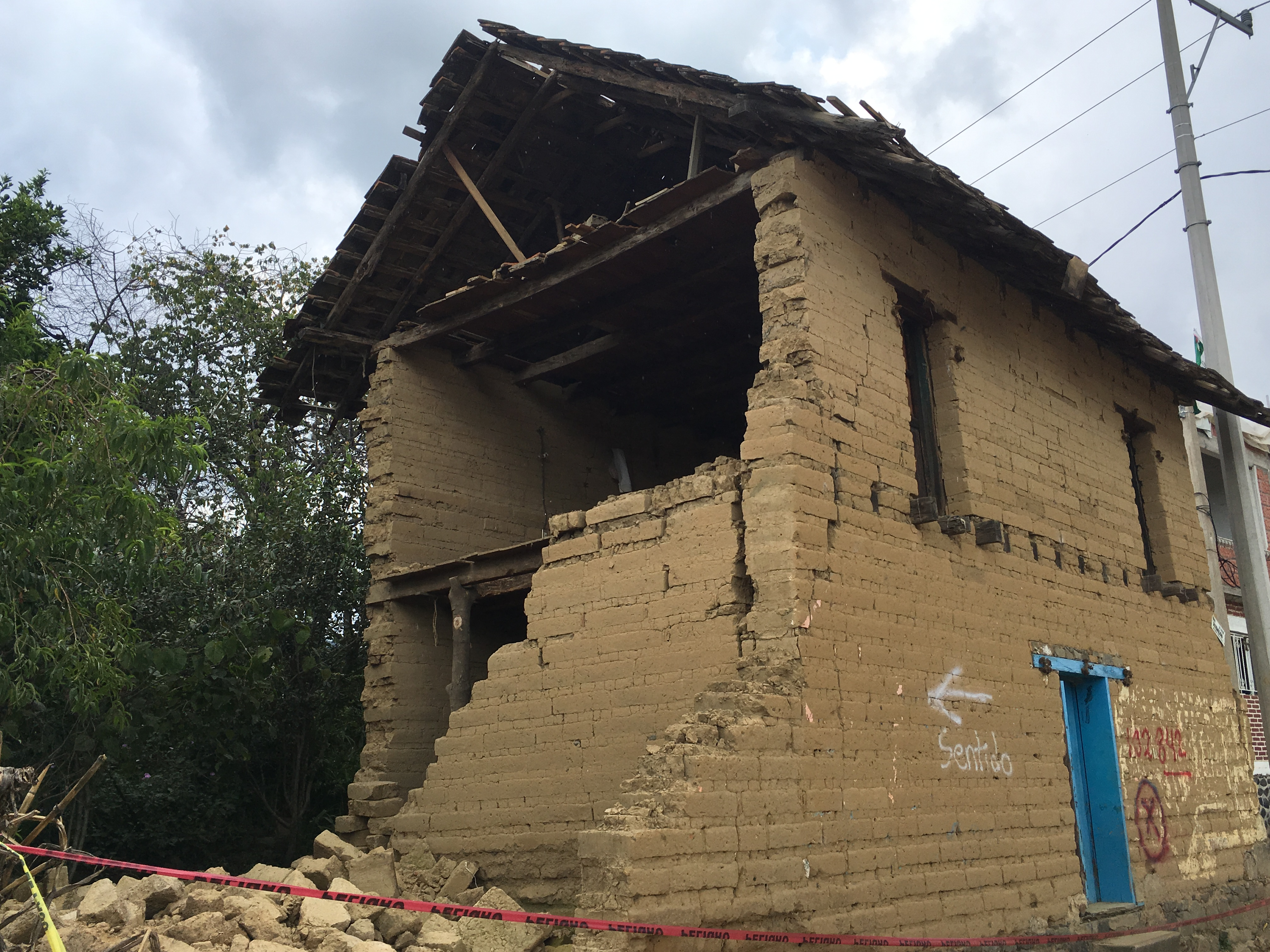 Sus casas estaban hechas de Adobe (es un ladrillo sin cocer,una pieza para construcción hecha de una masa de barro (arcilla y arena), mezclado a veces con paja, moldeada en forma de ladrillo y secada al sol; con ellos se construyen diversos tipos de elementos constructivos, como paredes, muros y arcos.​ La técnica de elaborarlos y su uso están extendidos por todo el mundo, encontrándose en muchas culturas que nunca tuvieron relación entre sí). Algunas de las casas ya están reconstruidas sin embargo faltan por construir.